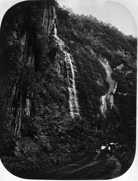 Foto. Waterval bij de kloof van Arau in de buurt van Pajakoemboeh, Sumatra.